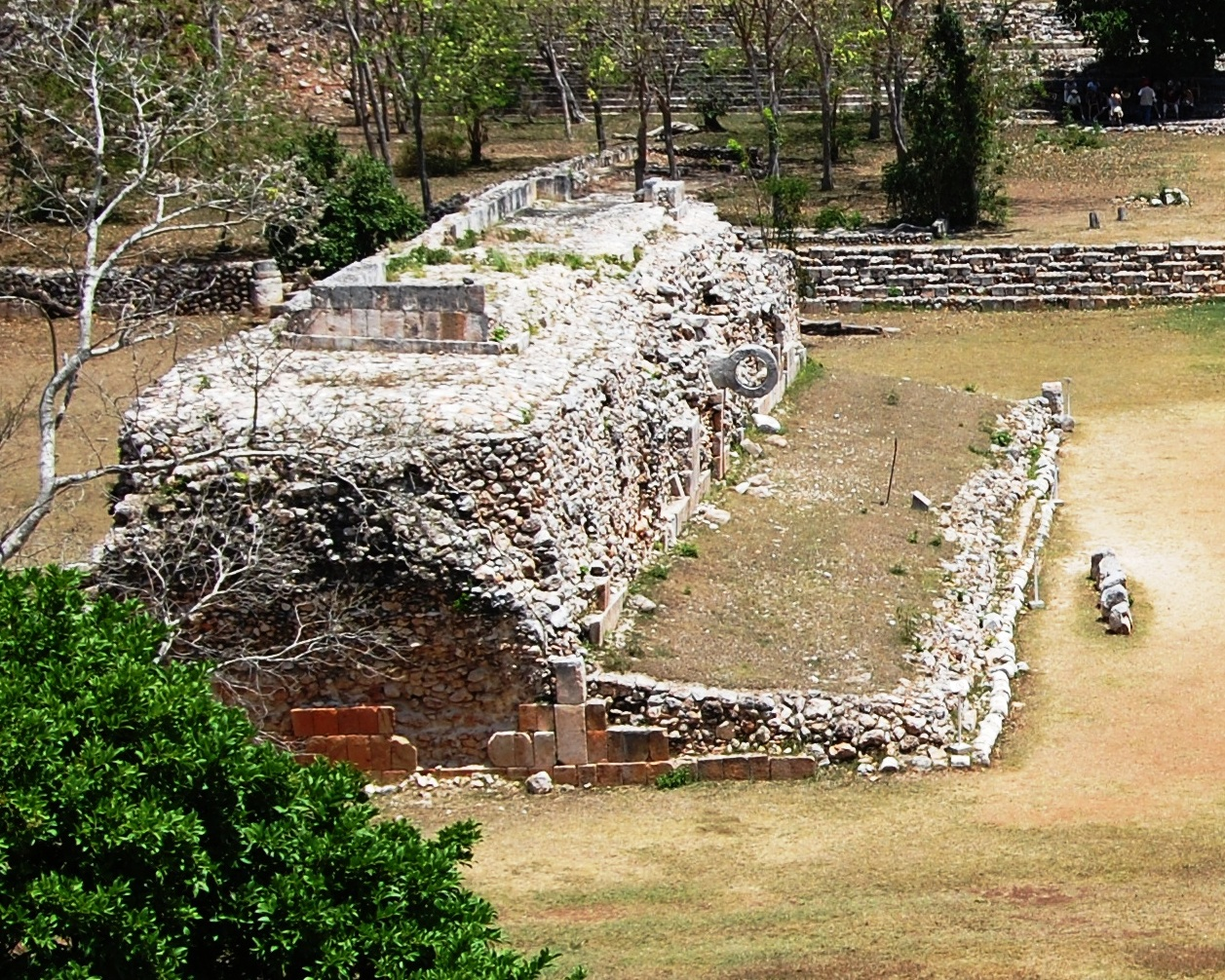 Uxmal, Mexico Juego de la pelota